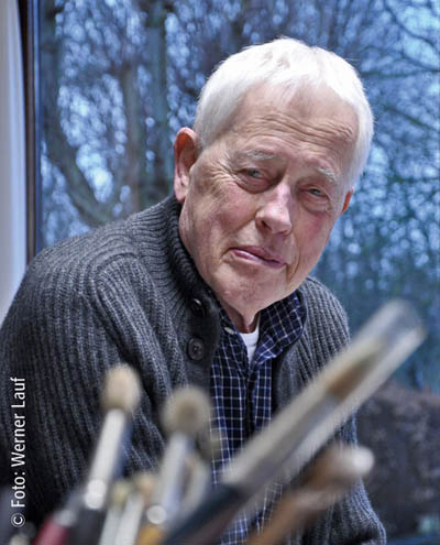 Diese Bild zeigt Gerhard Hermanns, einen norddeutschen Holzschneider, 2014